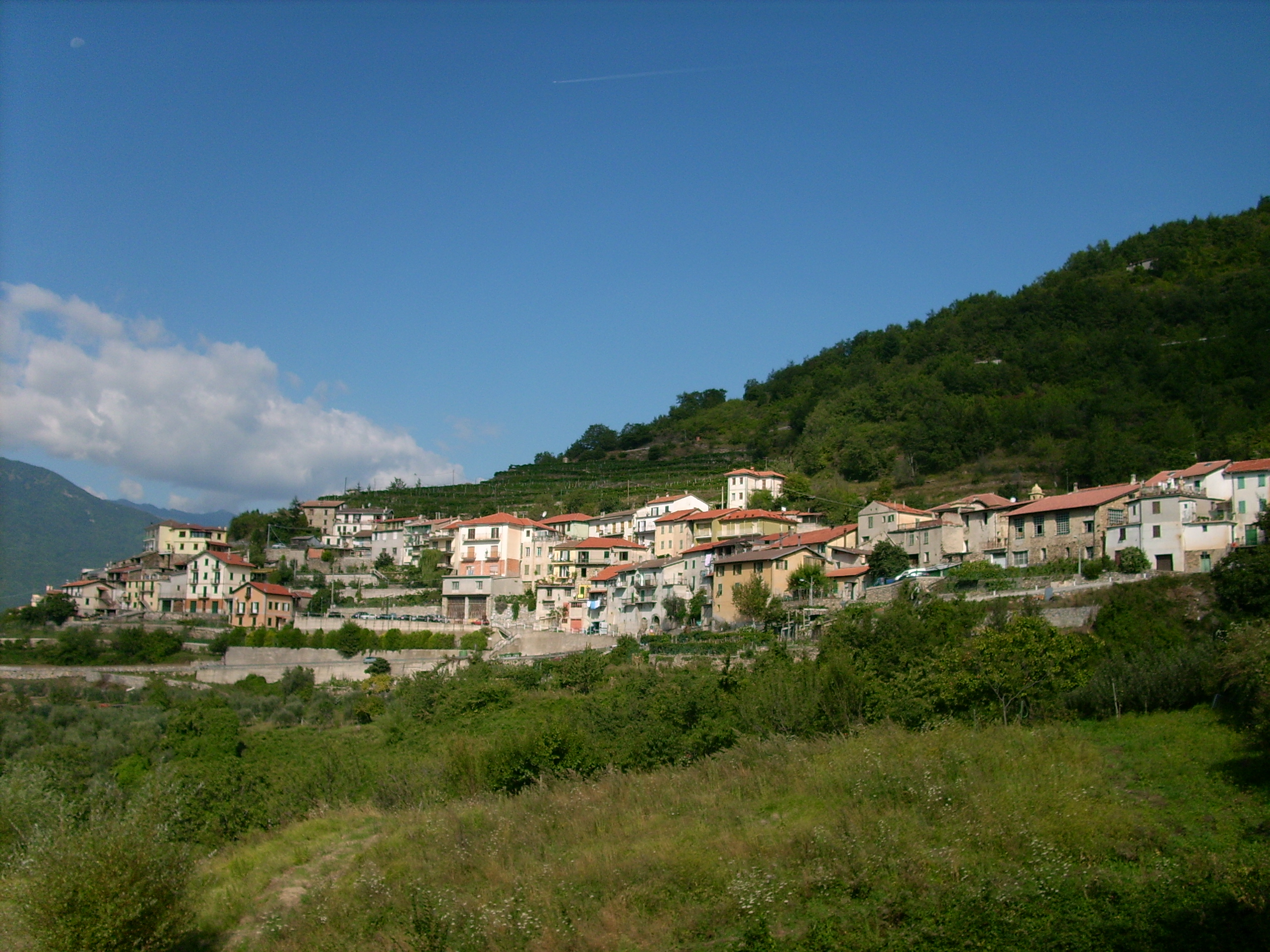 Pornassio, Liguria, Italia